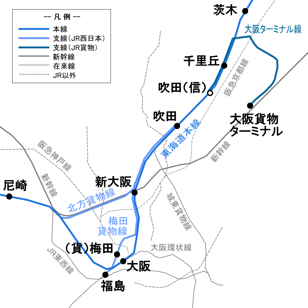 東海道本線大阪地区の支線図